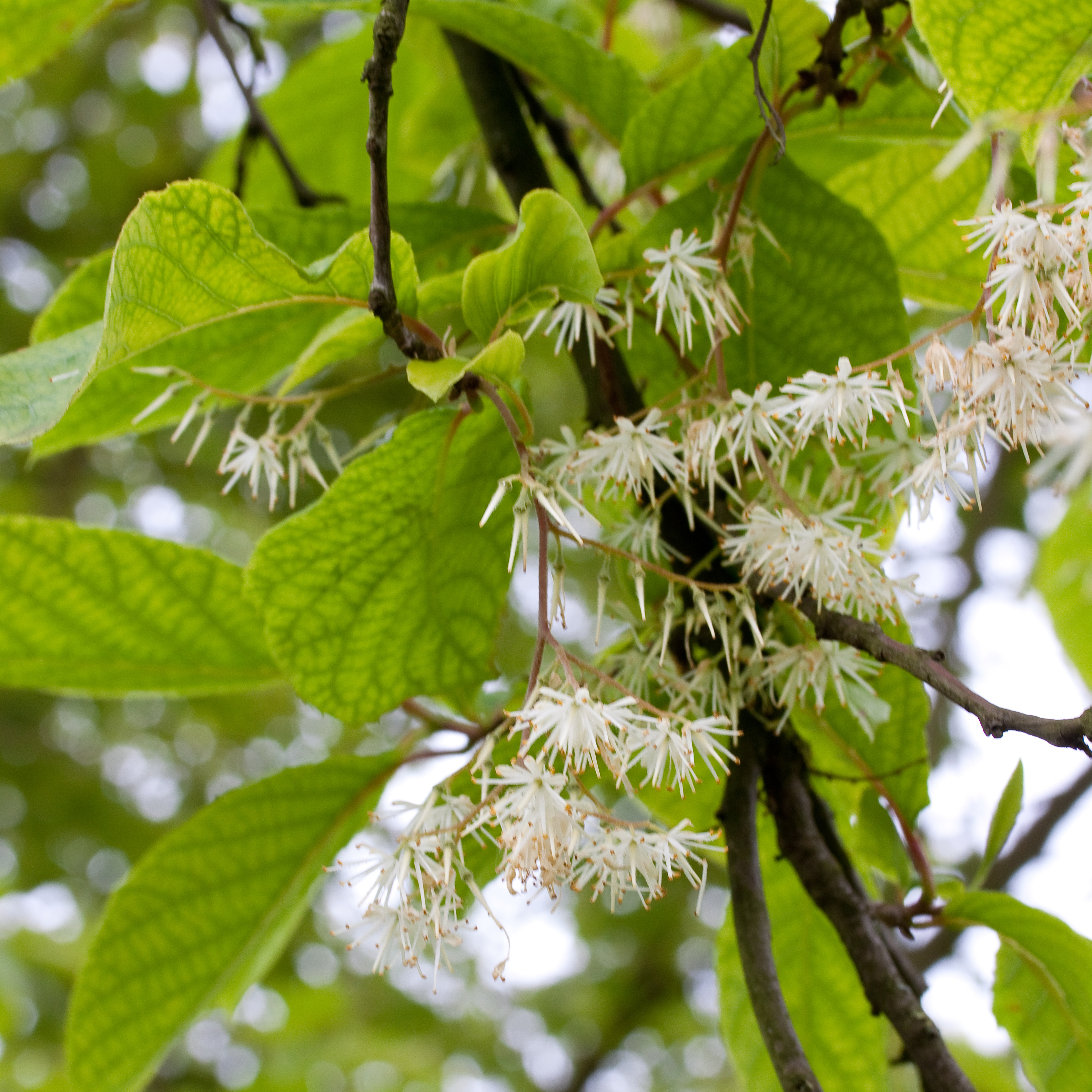 Fleurs de Pterostyrax psilophyllus - Jardin botanique de Strasbourg - France